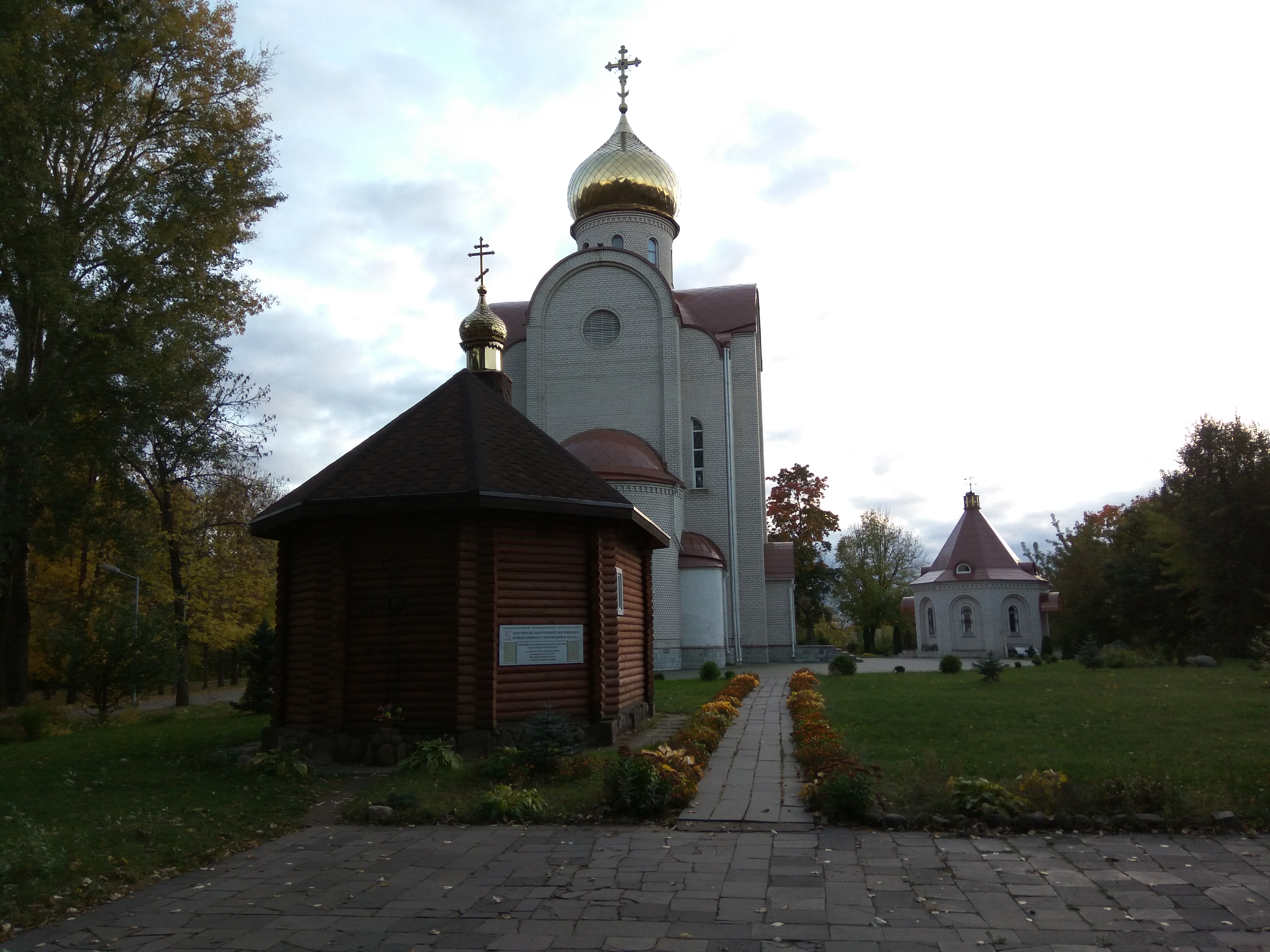 Магілёў. Парк культуры і адпачынку імя М. Горкага